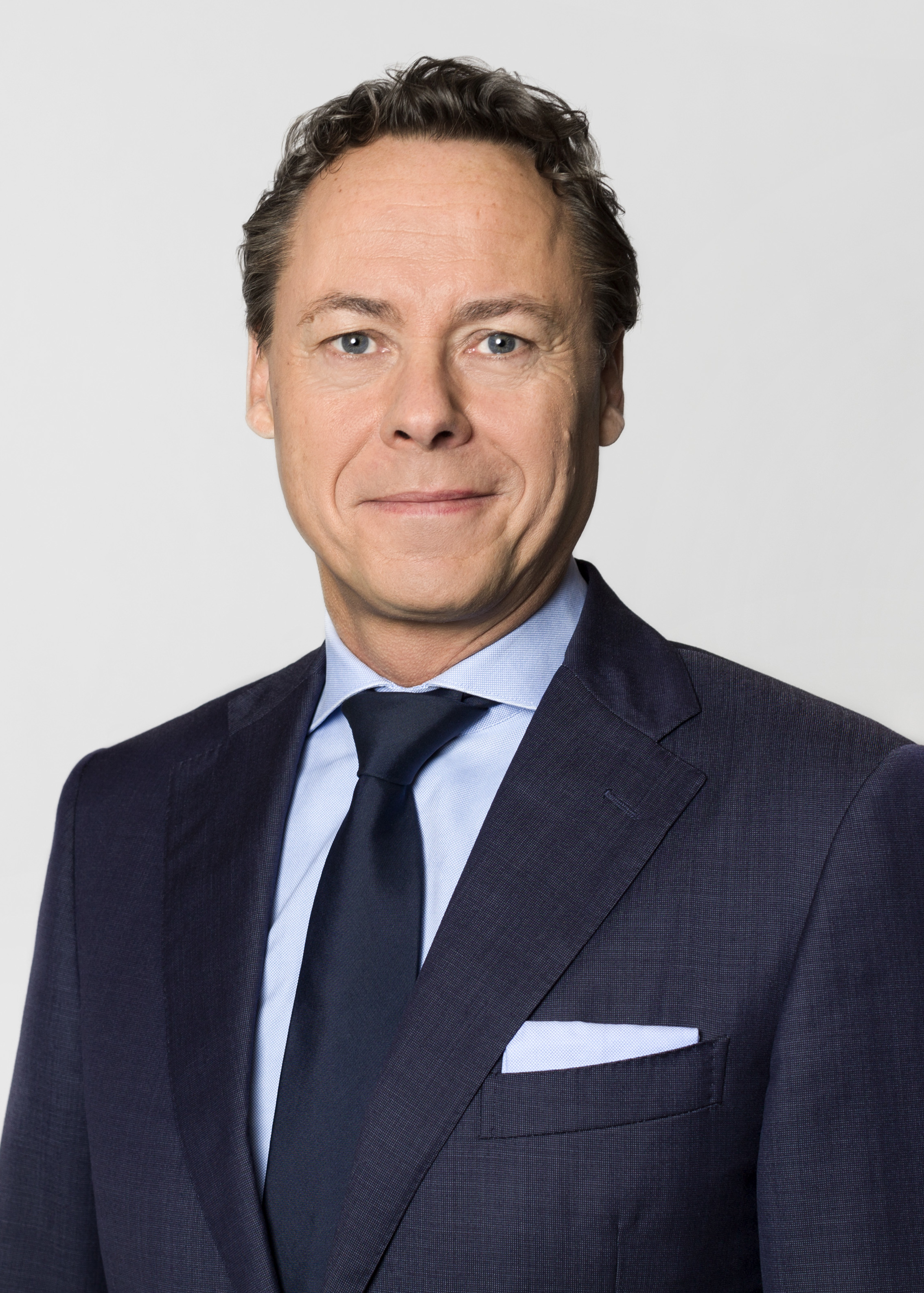 Ralph Hamers, bestuursvoorzitter van de ING GroepING Groep